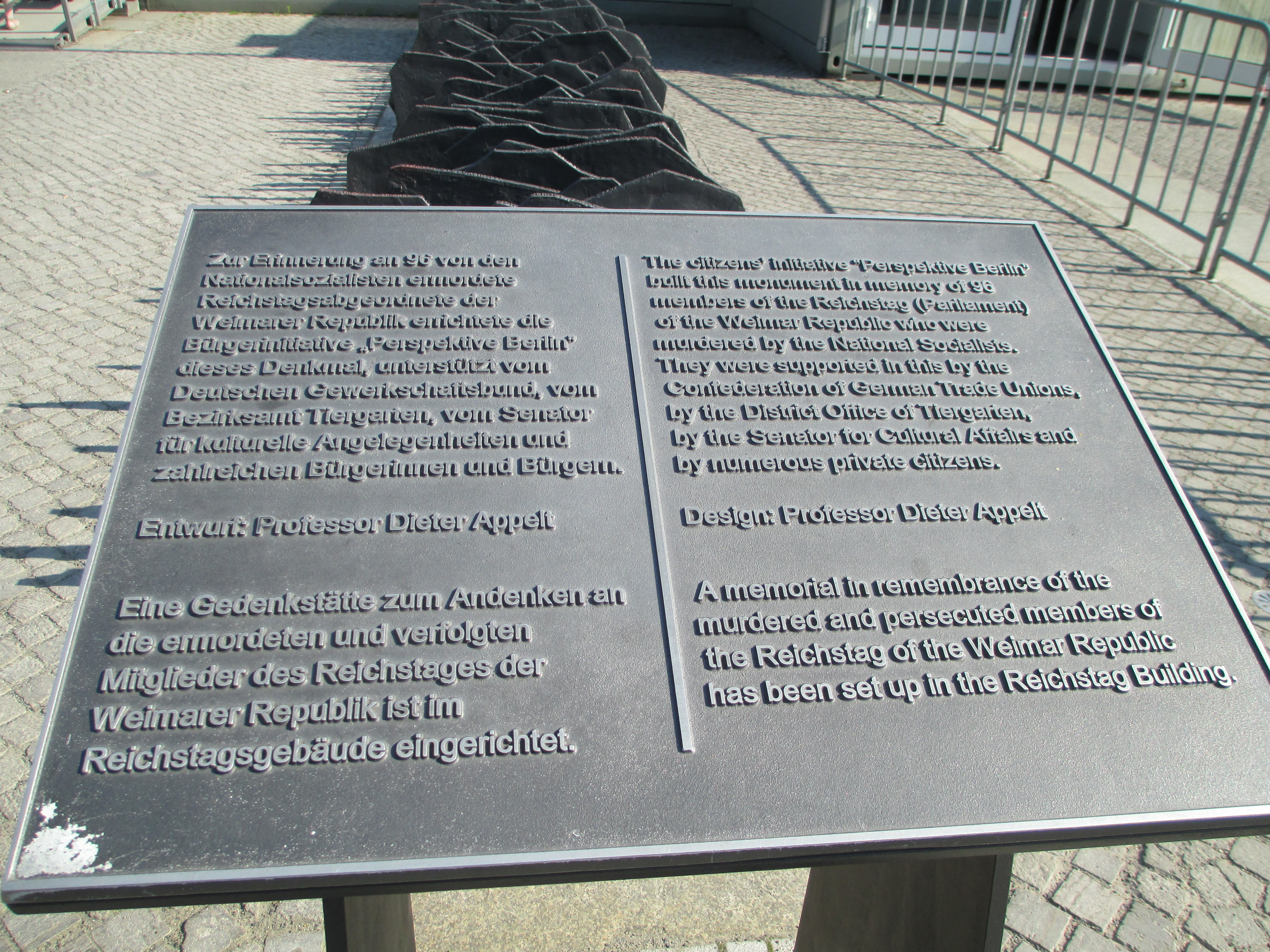 אנדרטת הרייכסטאג